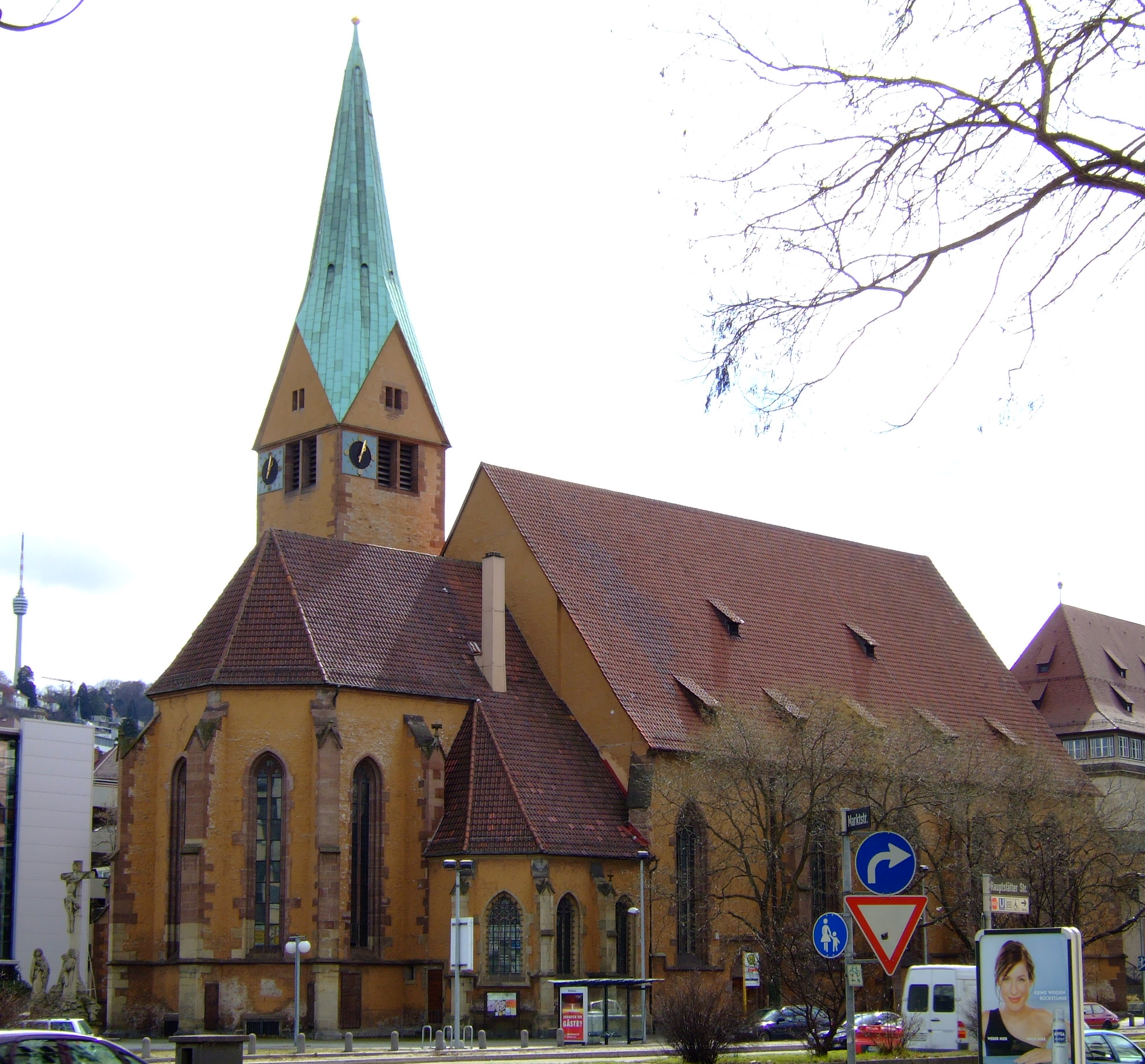 Church "Leonhardskirche" Of The City Stuttgart, Another View From The Other Side Of Street "Hauptstätter Straße"